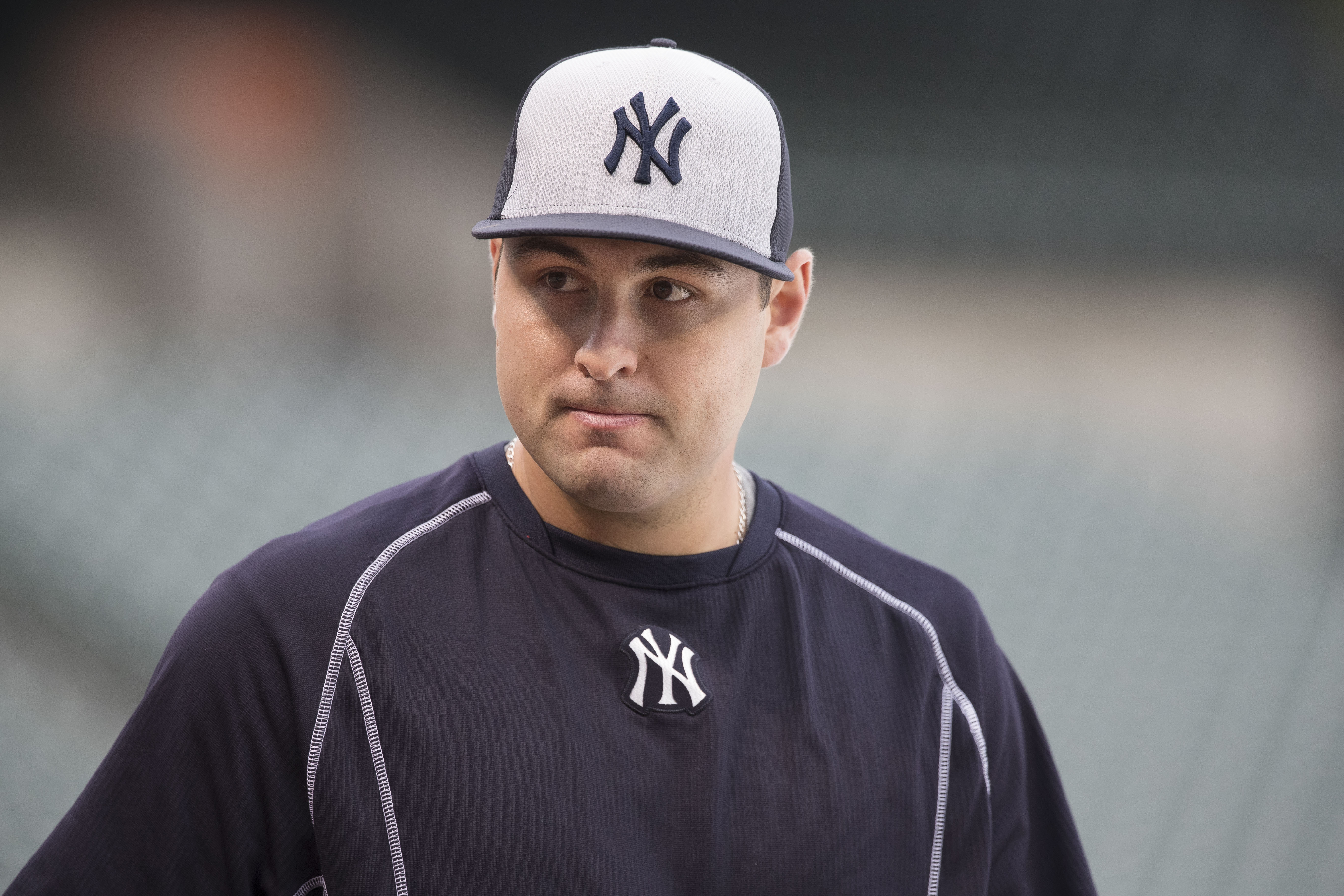 Nick Goody